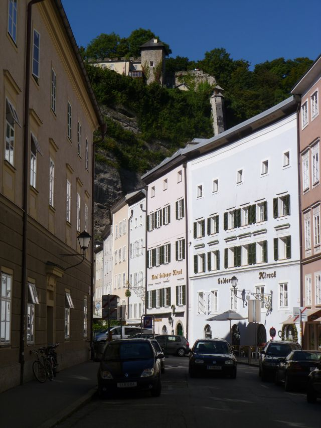 Salzburg, Stadtalm vom Universitätsplatz/Herbert-von-Karajan-Platz aus gesehen